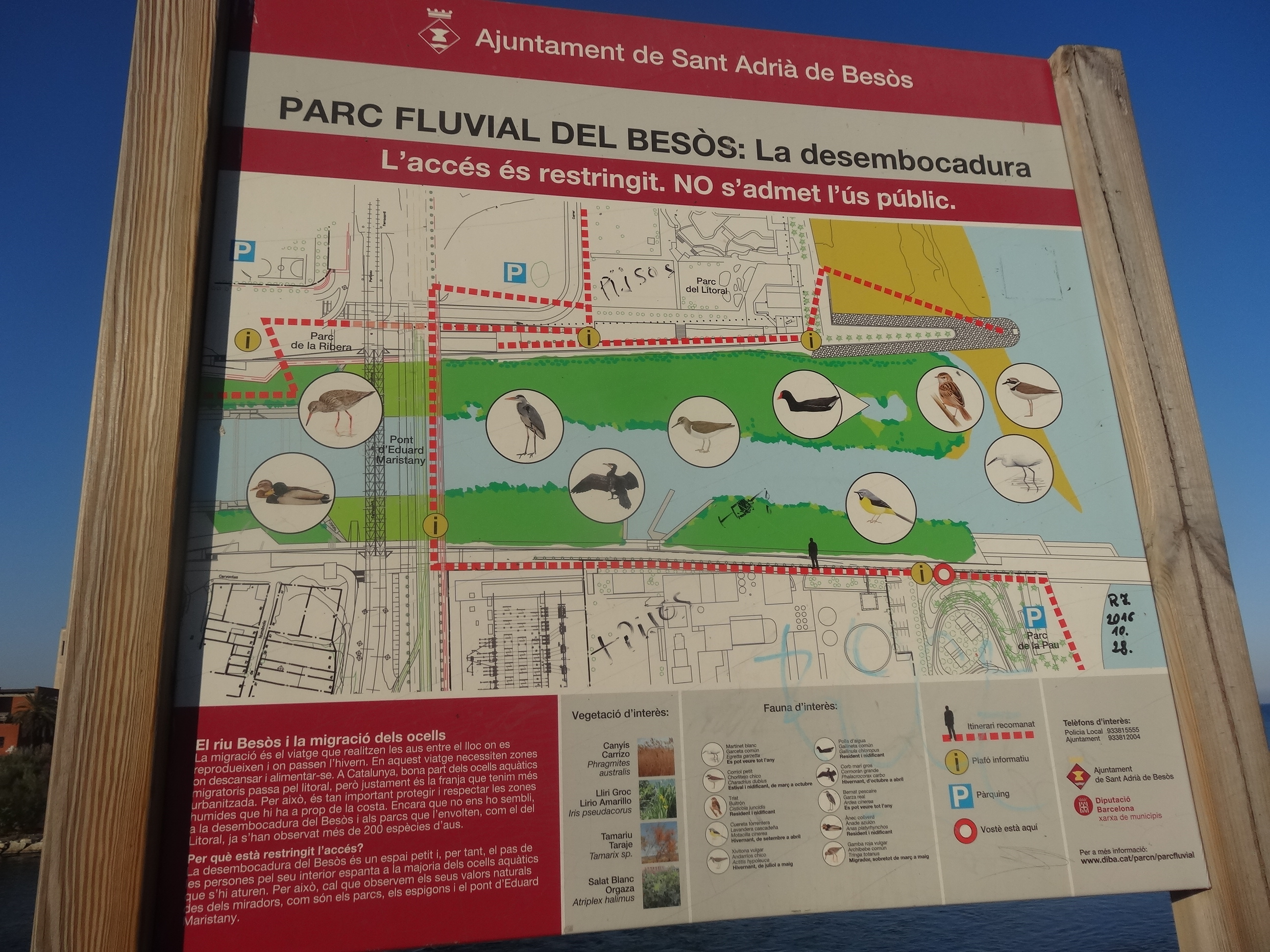 Parc Fluvial del Besòs